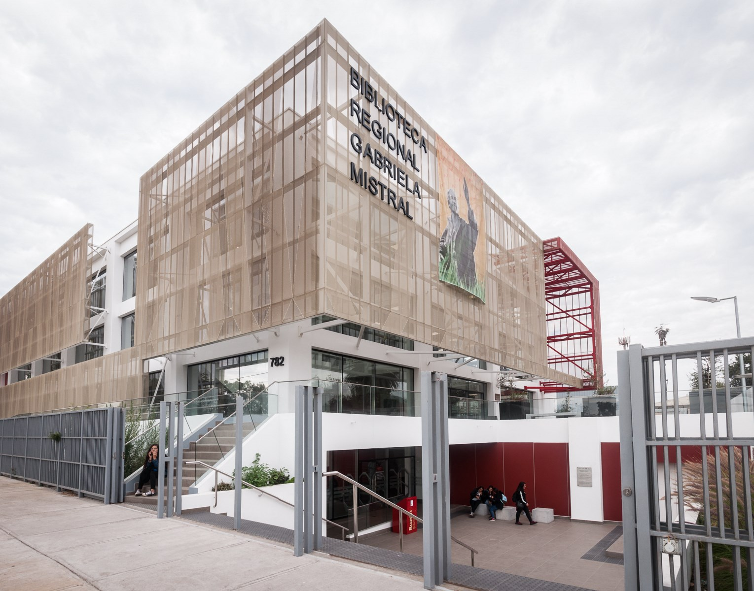 Biblioteca Regional de Coquimbo, ubicada en J.J. Latorre 782, La Serena.